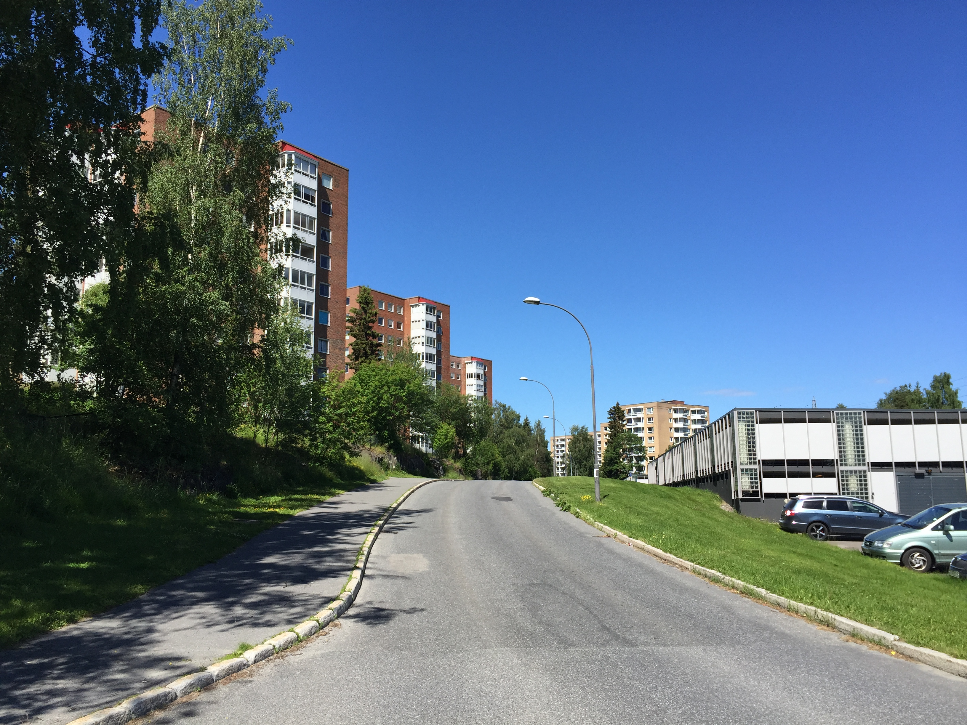 Henrik Sørensens vei i Oslo.